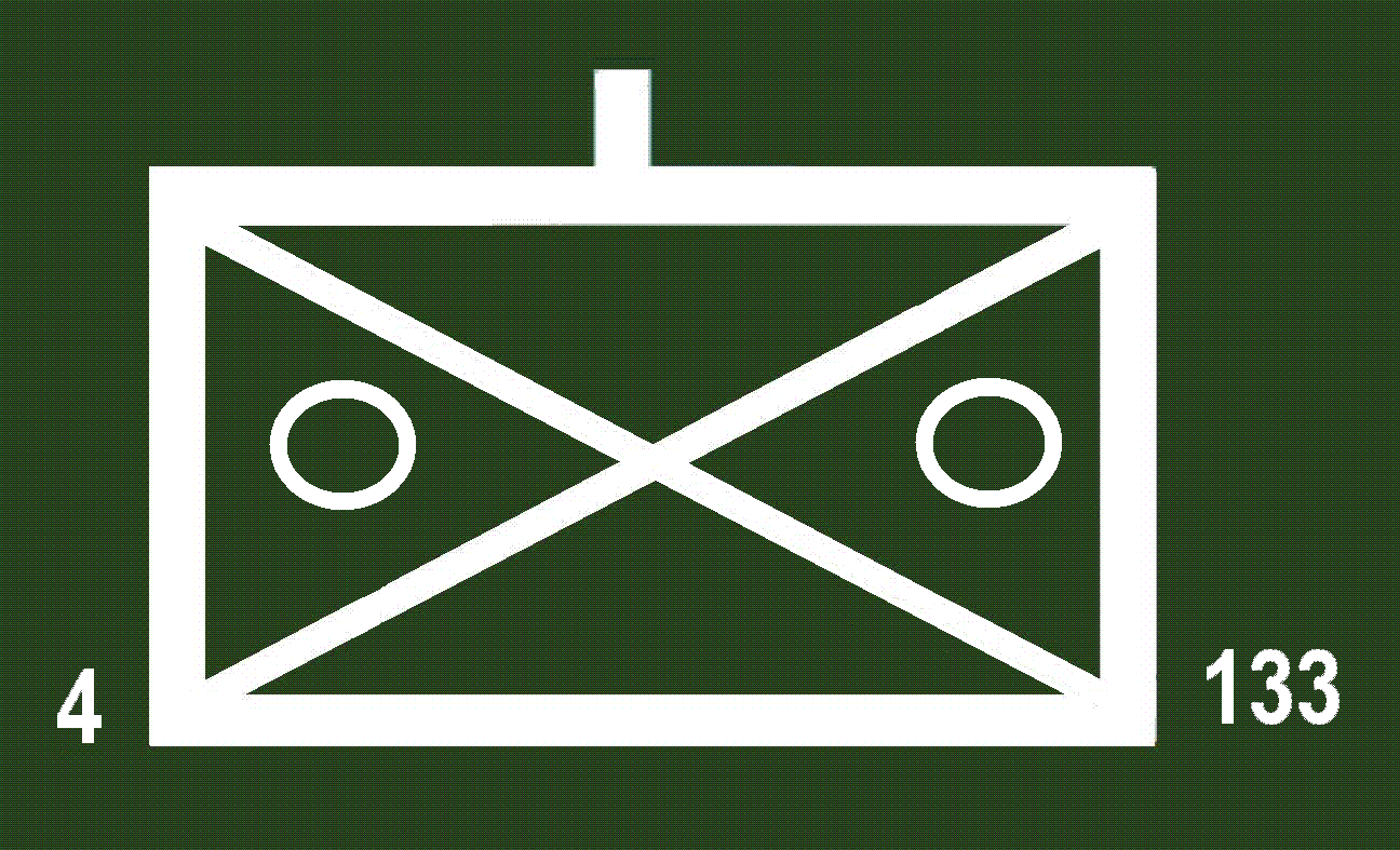 Taktisches zeichen der Panzergrenadiere (mot) der Bundeswehr